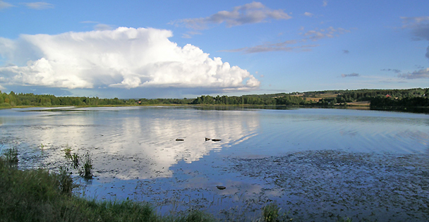 Åkersvika nature reserve, Hedmark, Norway.